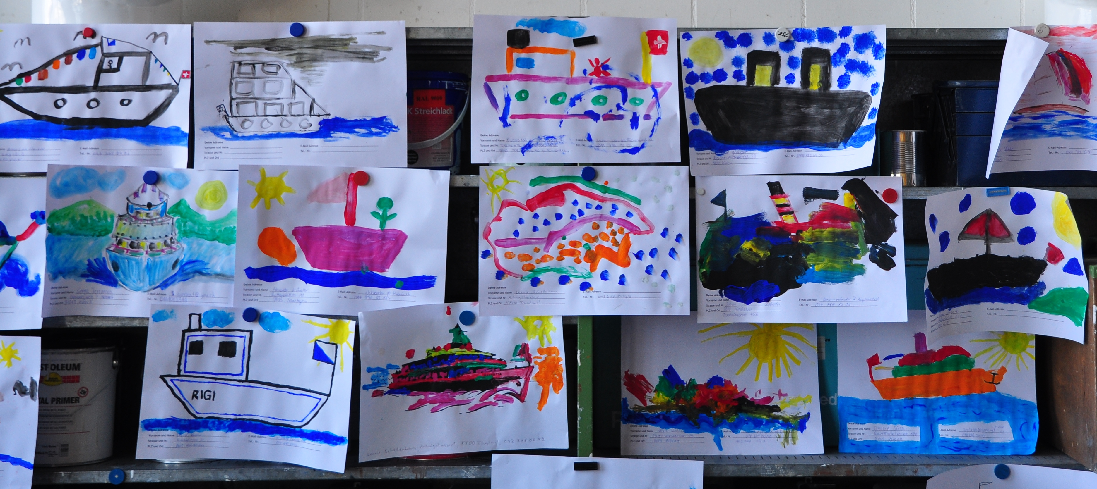 Tag der offenen Werft, Zürichsee-Schiffahrtsgesellschaft (ZSG) shipyard in Zürich-Wollishofen (Switzerland) : paddle steamship Stadt Zürich